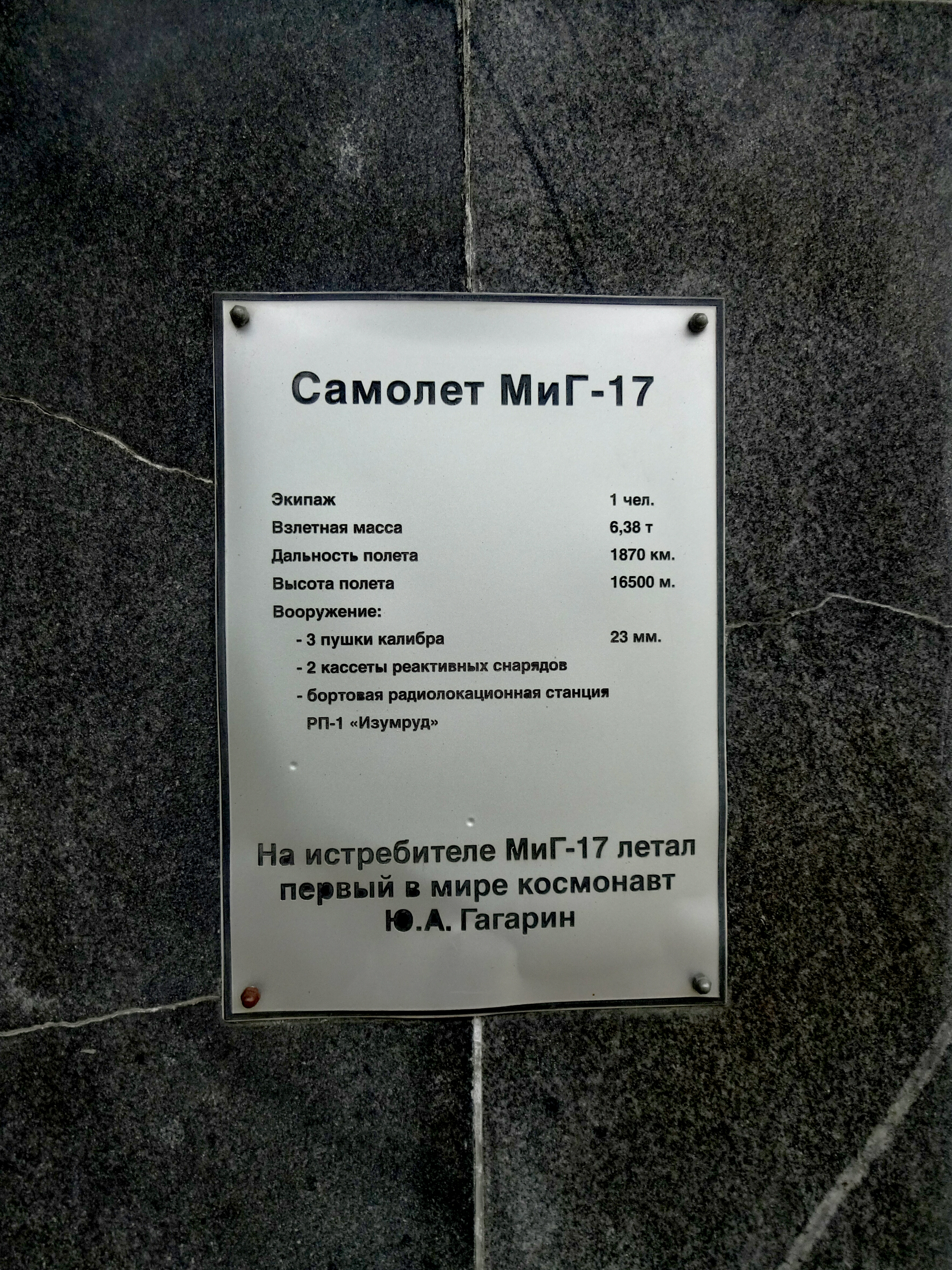 Самолет, на котором в 1955-1957 гг. летал курсант Оренбургского высшего авиационного училища Гагарин Ю.А.: улица Челюскинцев, 21, Оренбург, Оренбургская область